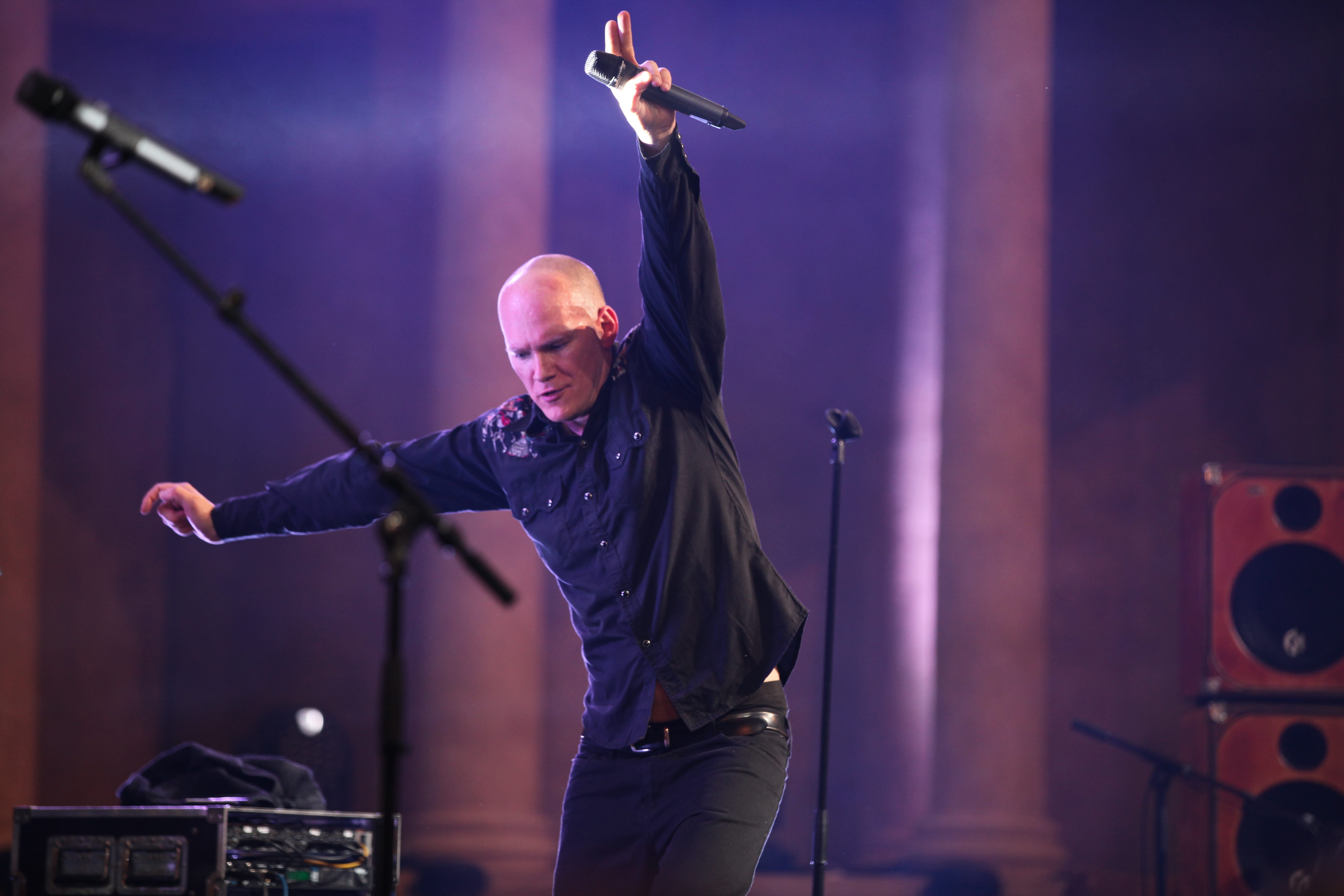 Rainer von Vielen mit Band auf dem Heimatsoundfestival 2015 in Oberammergau. Rainer Von Vielen Gesang, Akkordeon, Gitarre: Rainer von Vielen (Rainer Hartmann) Gitarre: Mitsch Oki (Michael Schönmetzer) Bassgitarre: Dan Le Tard (Daniel Schubert) Schlagzeug: Sebastian Schwab